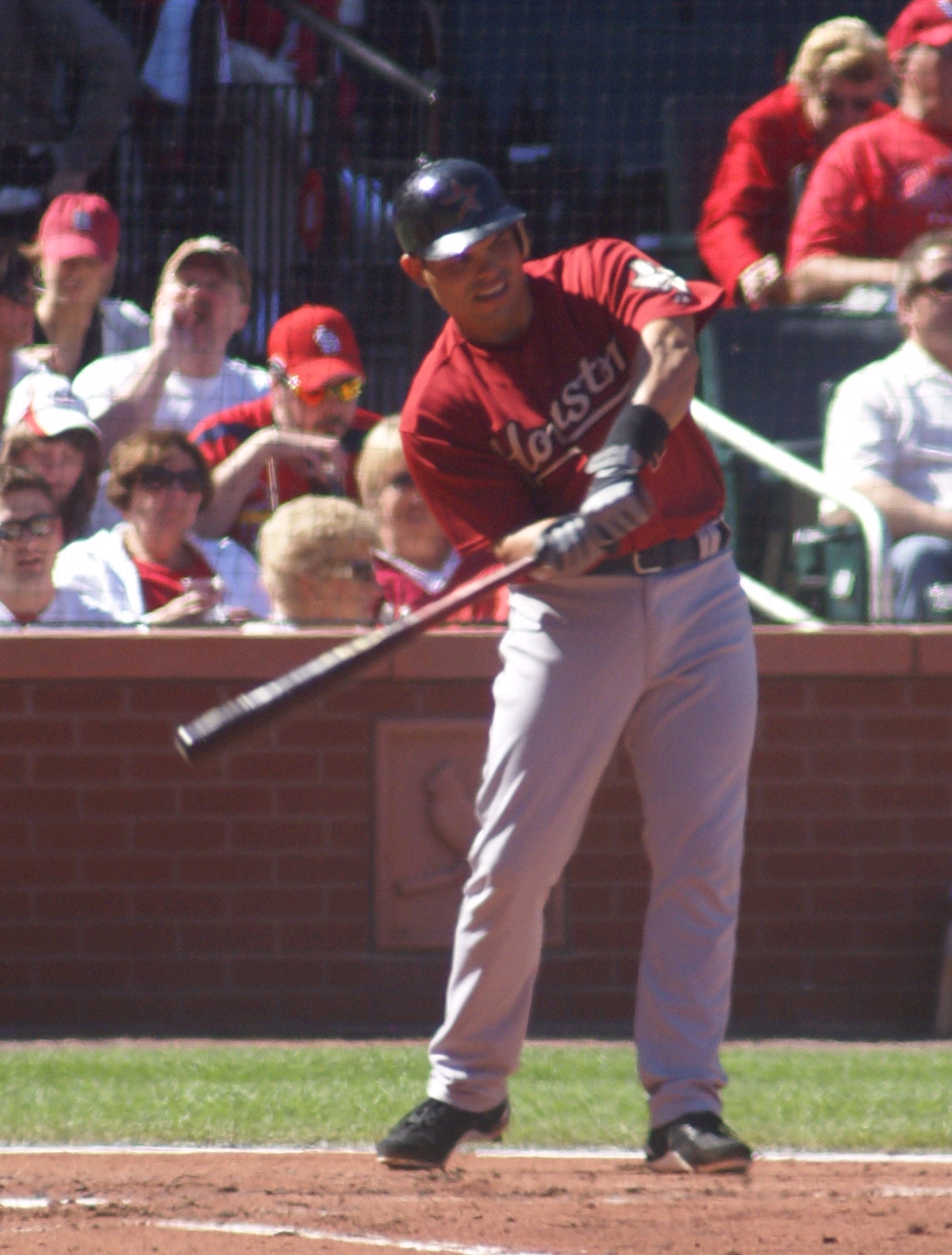 Iván Rodríguez